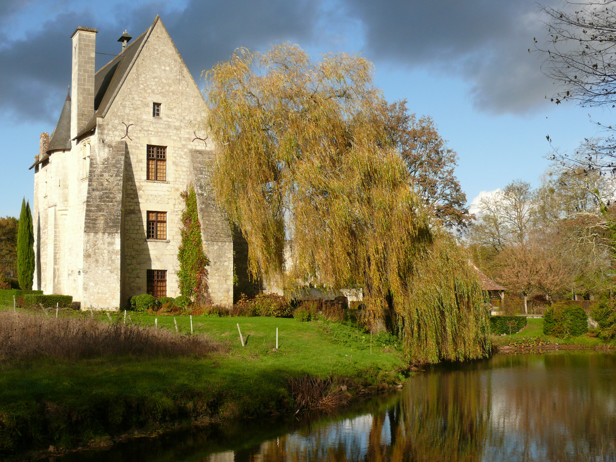 Ancienne abbaye bénédictine de Turpenay à Saint-Benoît-la-Forêt